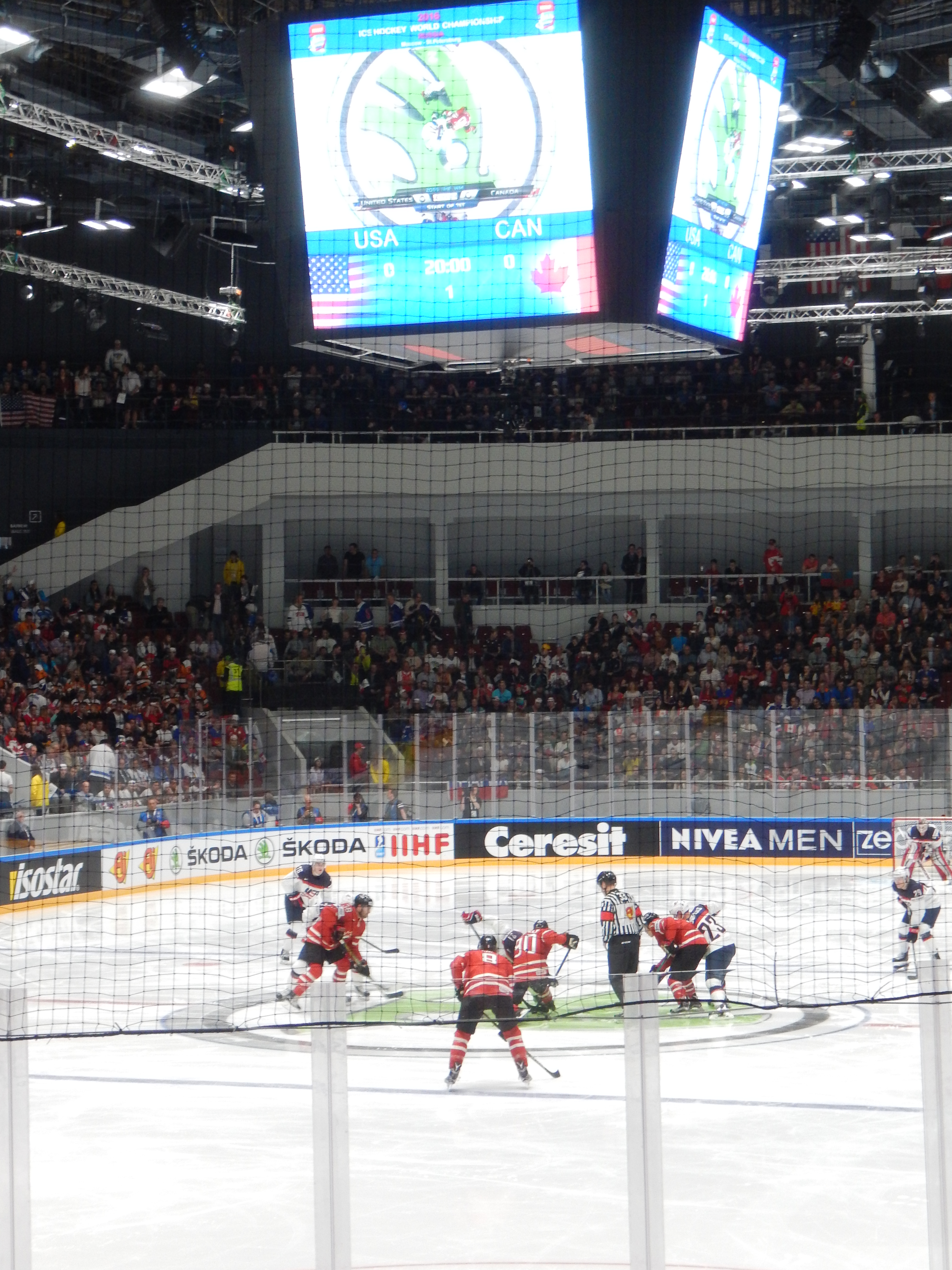 Стартовое вбрасывание в матче группового этапа между сборными США и Канады